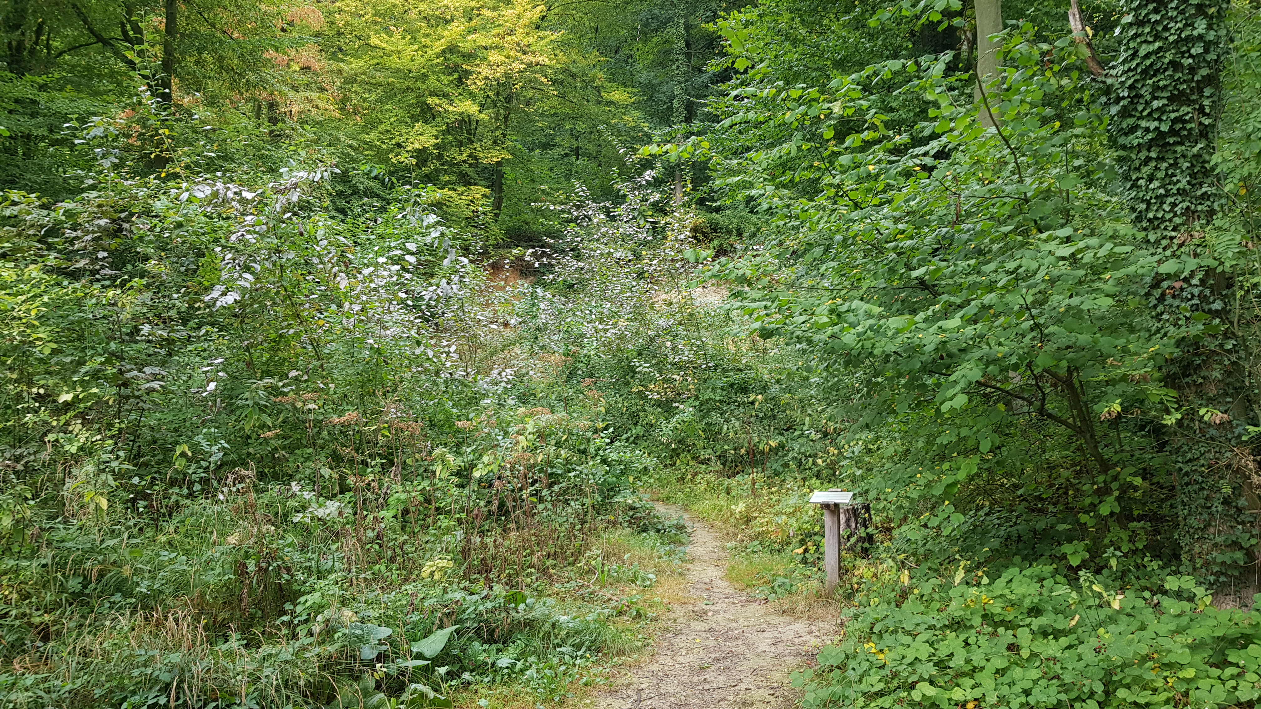 Groeve Bovenste Bosch, Epen, Gulpen-Wittem, Nederland